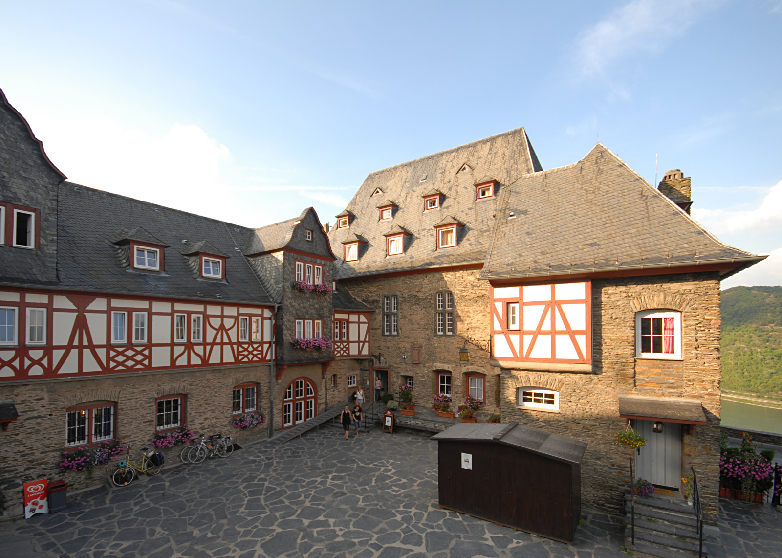 Burg Stahleck über Bacharach, Langhaus, Palas und Küchenbau